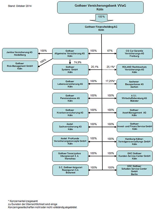 Organigramm des Gothaer Konzerns